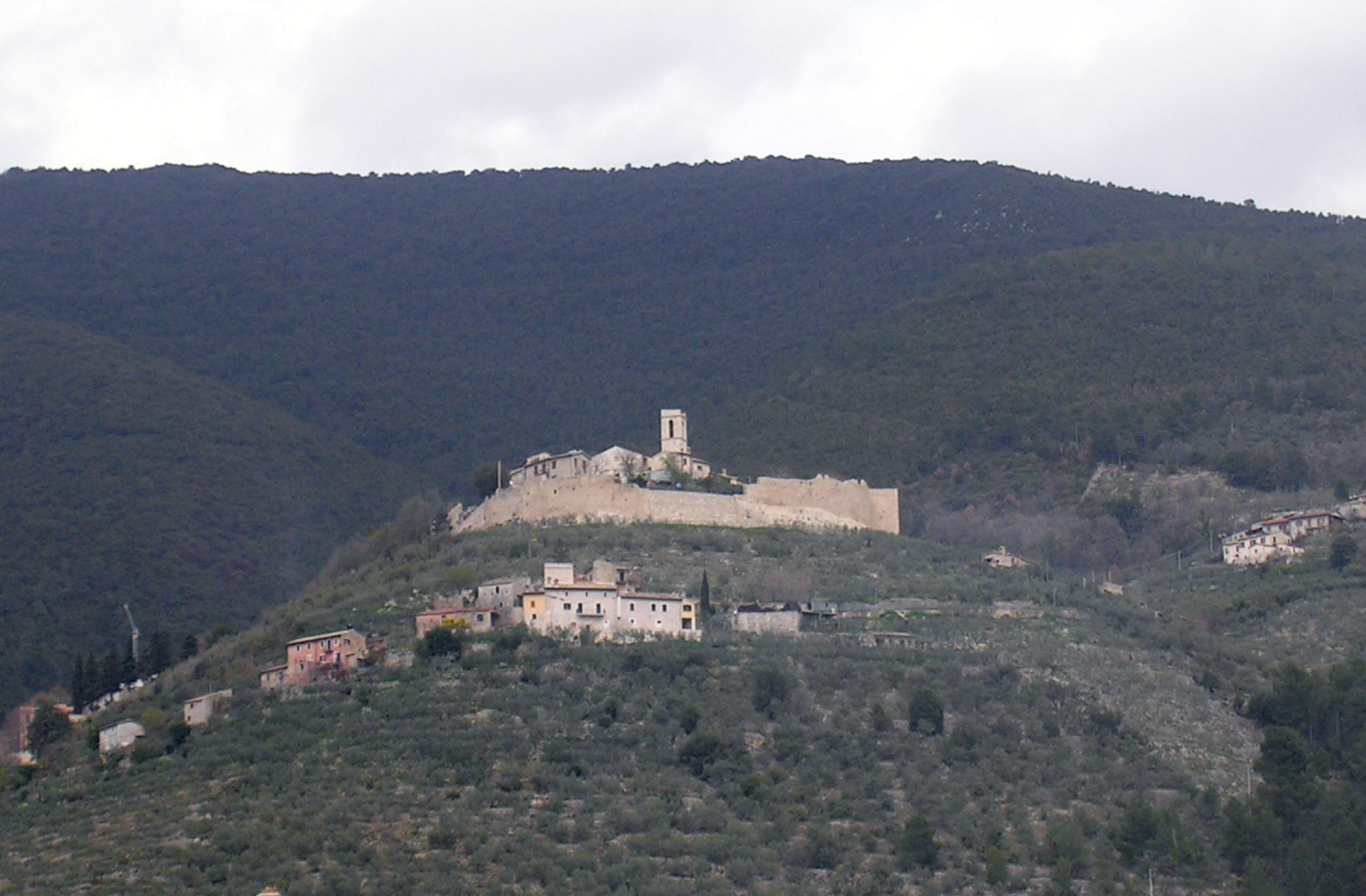 Campello Alto, frazione di Campello sul Clitumno, provincia di Perugia